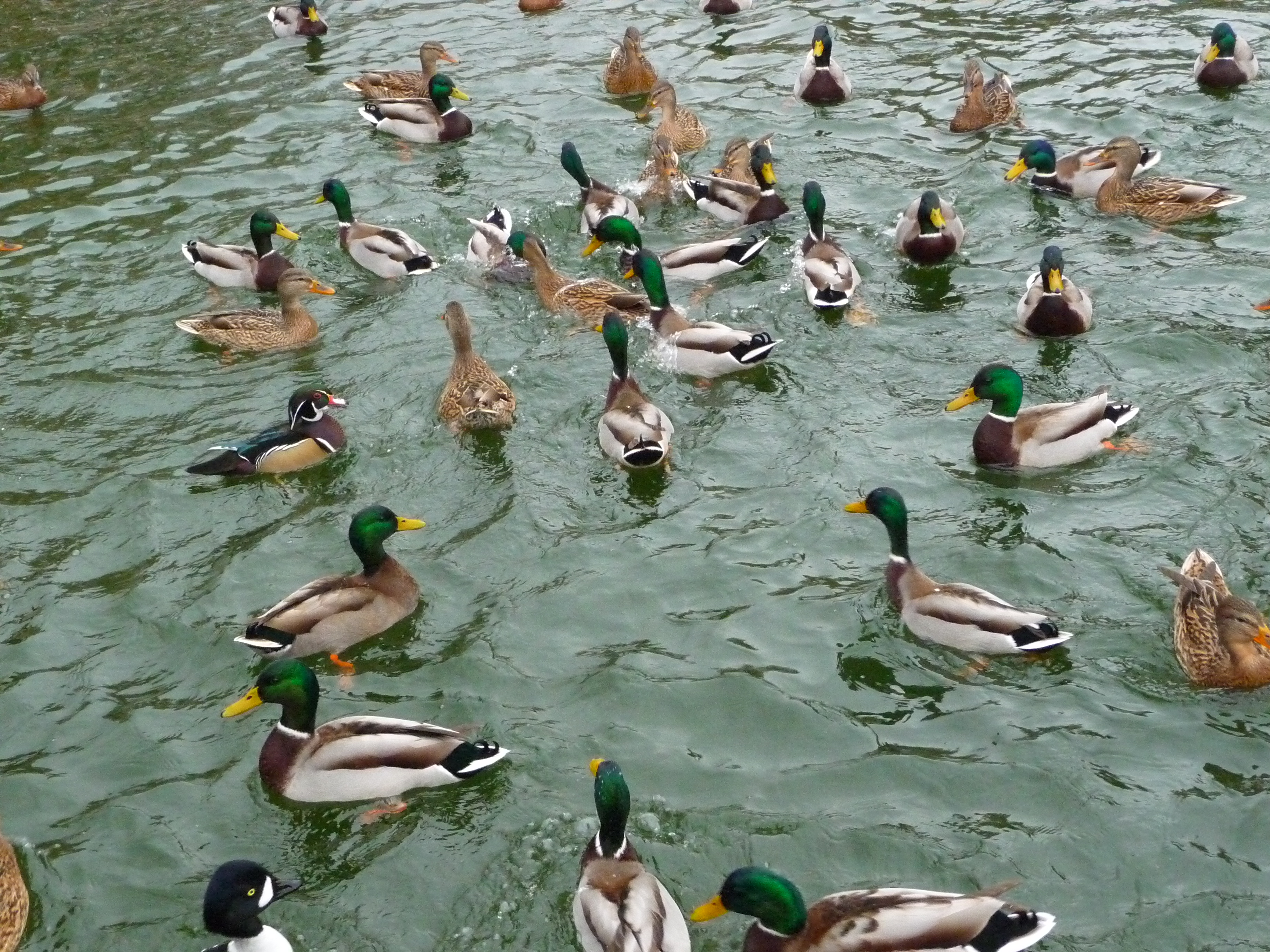 Gruppe männlicher und weiblicher Stockenten auf einem Weiher , außerdem zusehen sind eine Schellente (Bildrand links unten) und eine Brautente ((Mitte links)